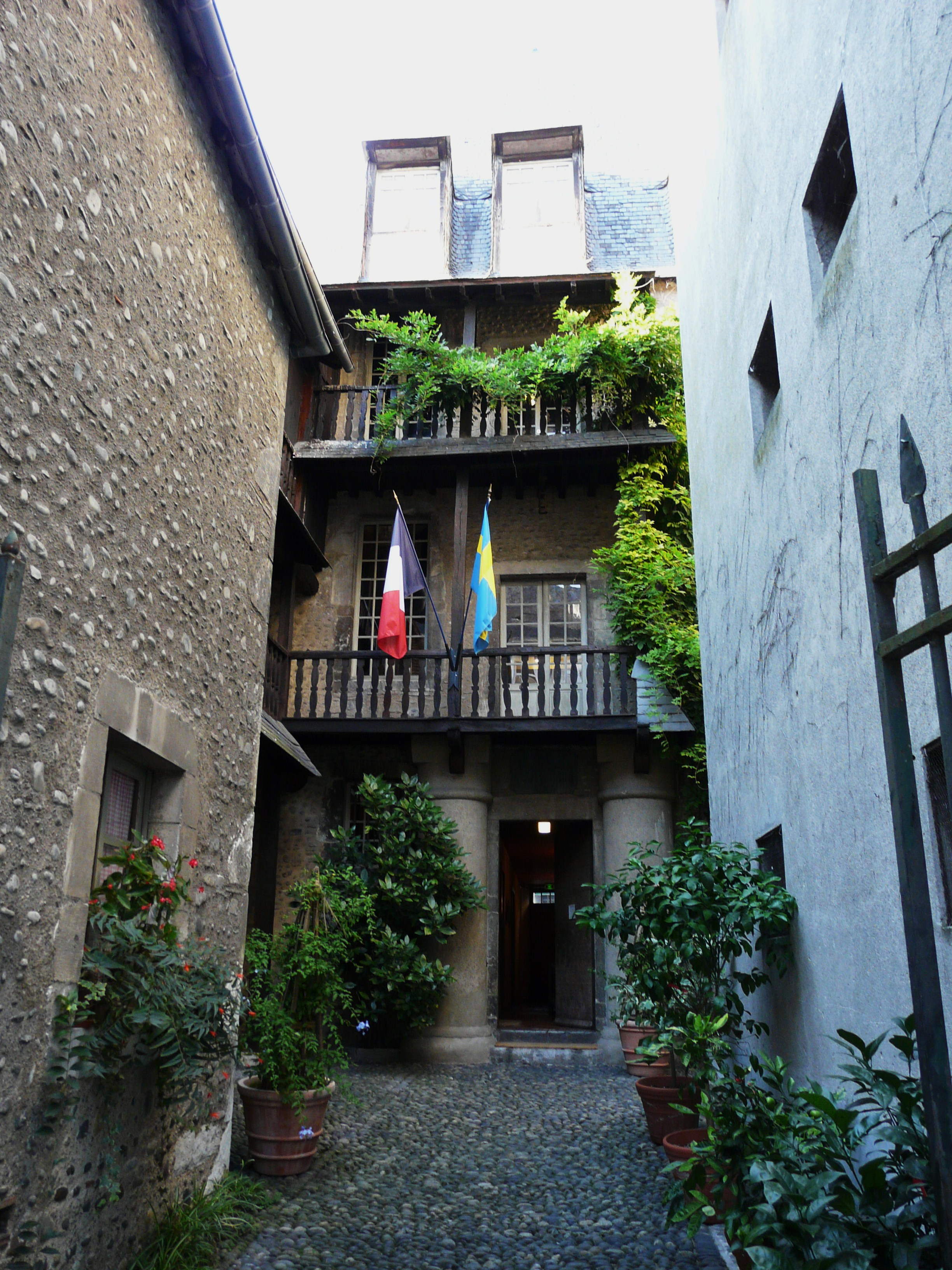 L'entrée du musée Bernadotte (maison natale de Bernadotte), rue Tran, Pau, Pyrénées-Atlantiques, France.